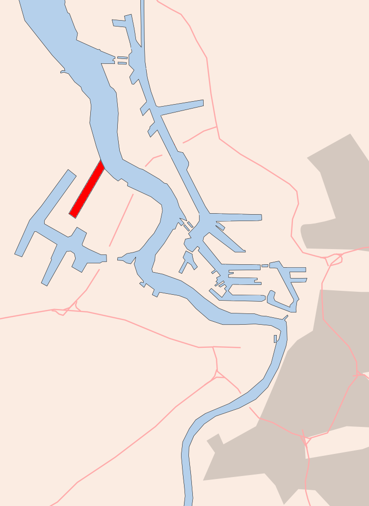 Deurganckdok